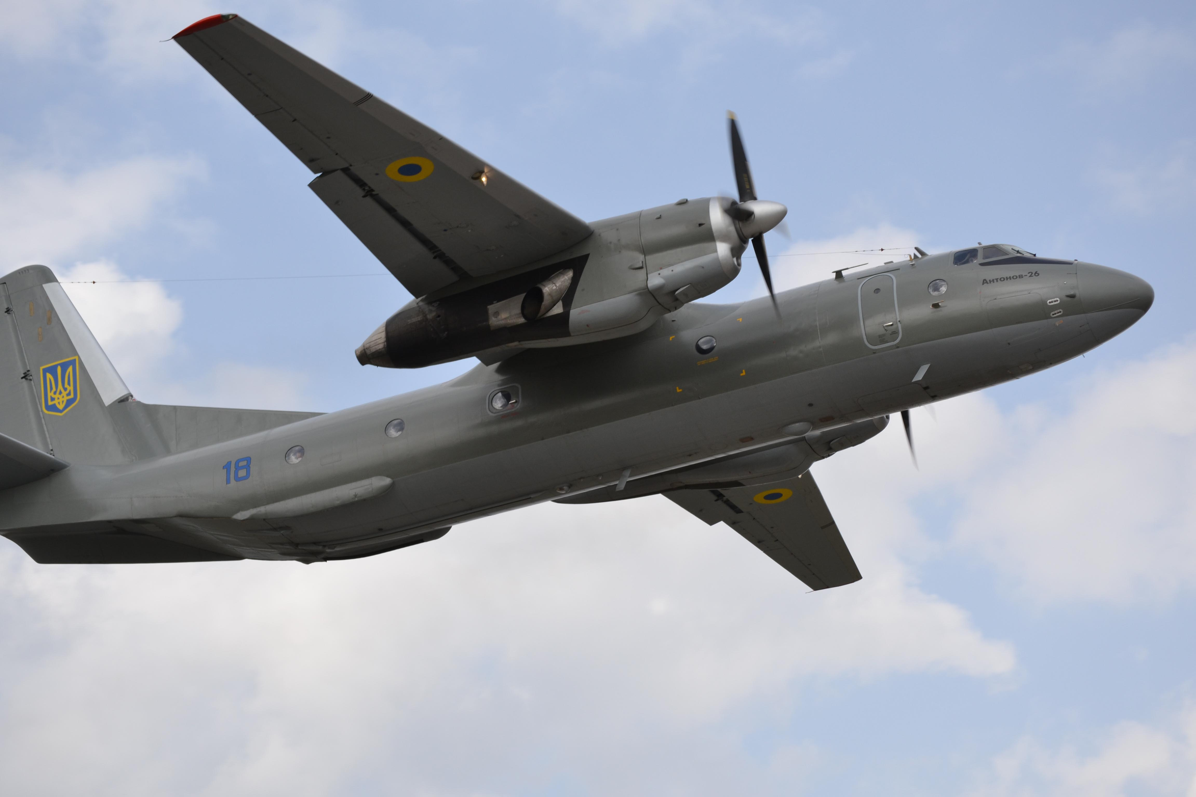 На військовому аеродромі гвардійської бригади транспортної авіації Повітряних Сил Збройних Сил України відбулися планові польоти екіпажів військово-транспортних літаків Ан-26 та вертольотів Мі-8. Під час польотів, в рамках тактико-спеціальних навчань, військові розвідники частин спеціального призначення Збройних Сил України відпрацювали десантування парашутним способом з повітряних суден в умовний тил противника для виконання спеціальних завдань. Автор фото: Андрій Агєєв